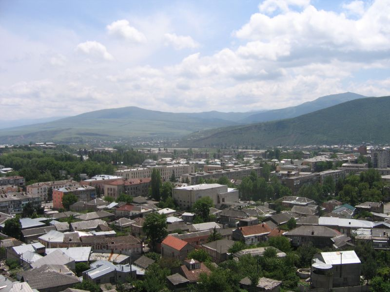 Gori, Georgia